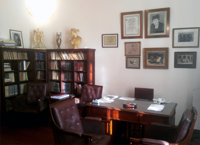 Το γραφείο της Α.Παναγιωτάτου με τα διπλώματα, φωτογραφίες και τις προσωπικες διακρίσεις της